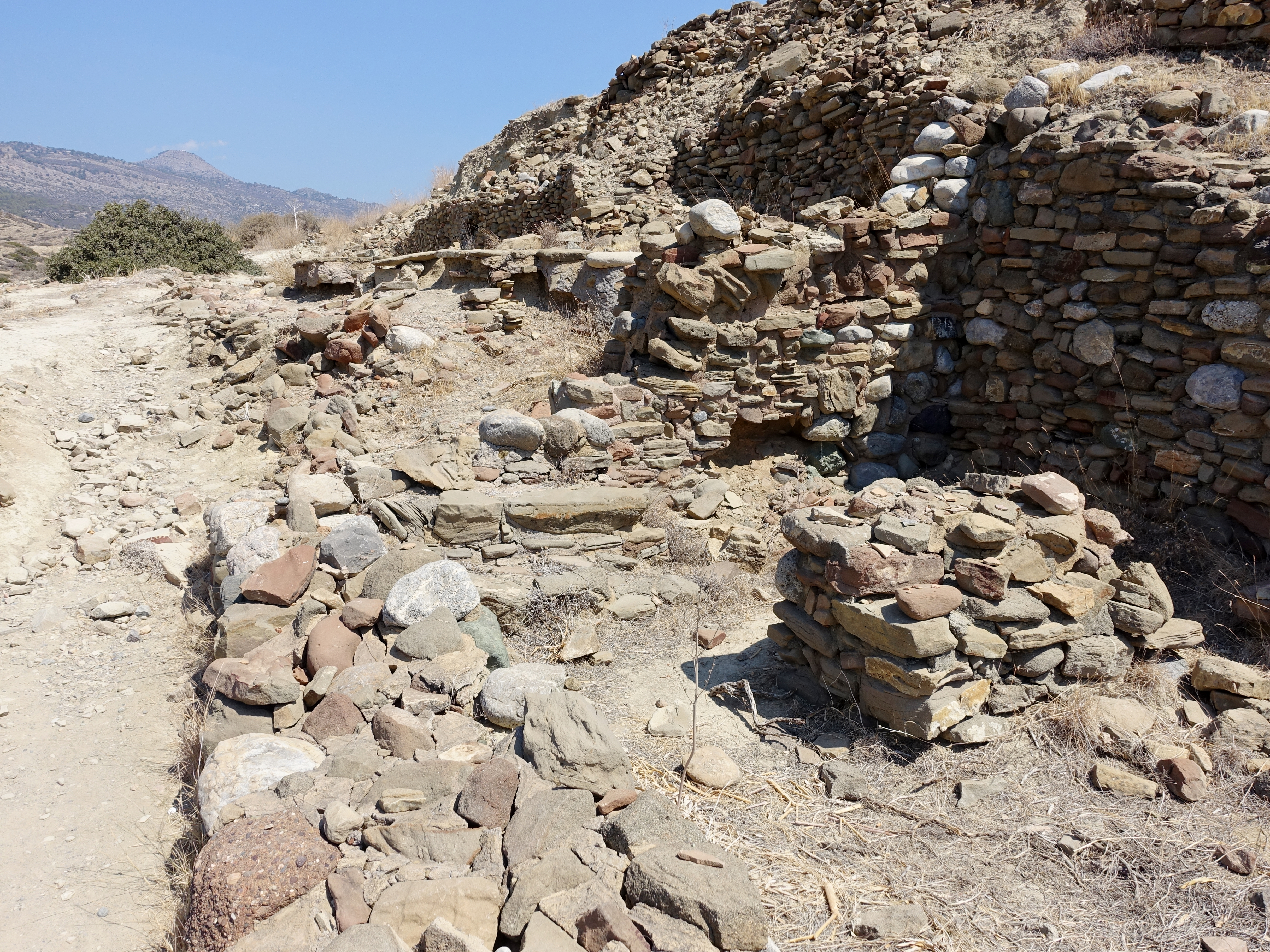 Ausgrabungsstätte von Pyrgos bei Myrtos, Kreta, Griechenland